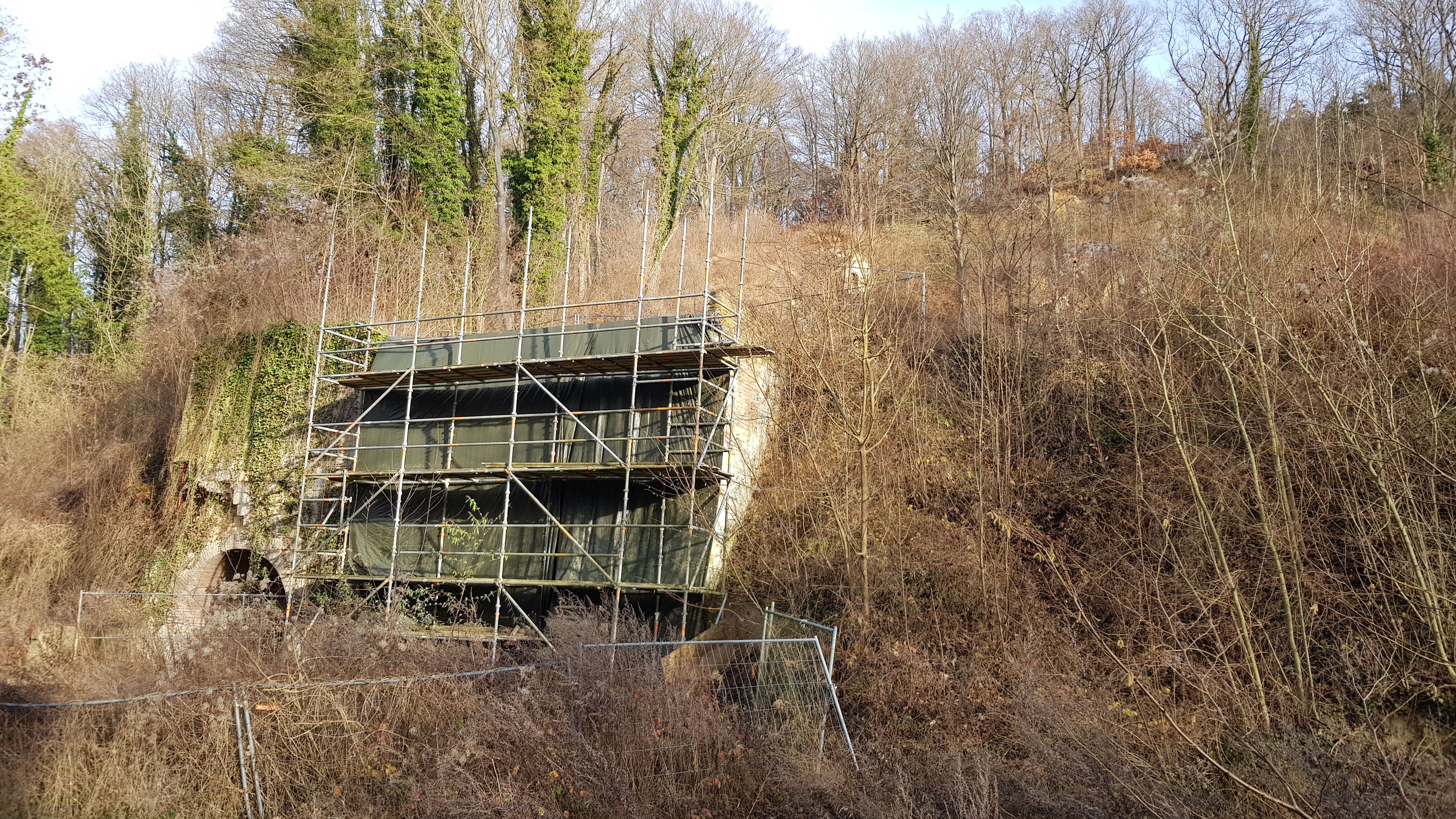 Kalkoven Biebosch, Sibbergrubbe, Sibbe, Valkenburg aan de Geul, Nederland